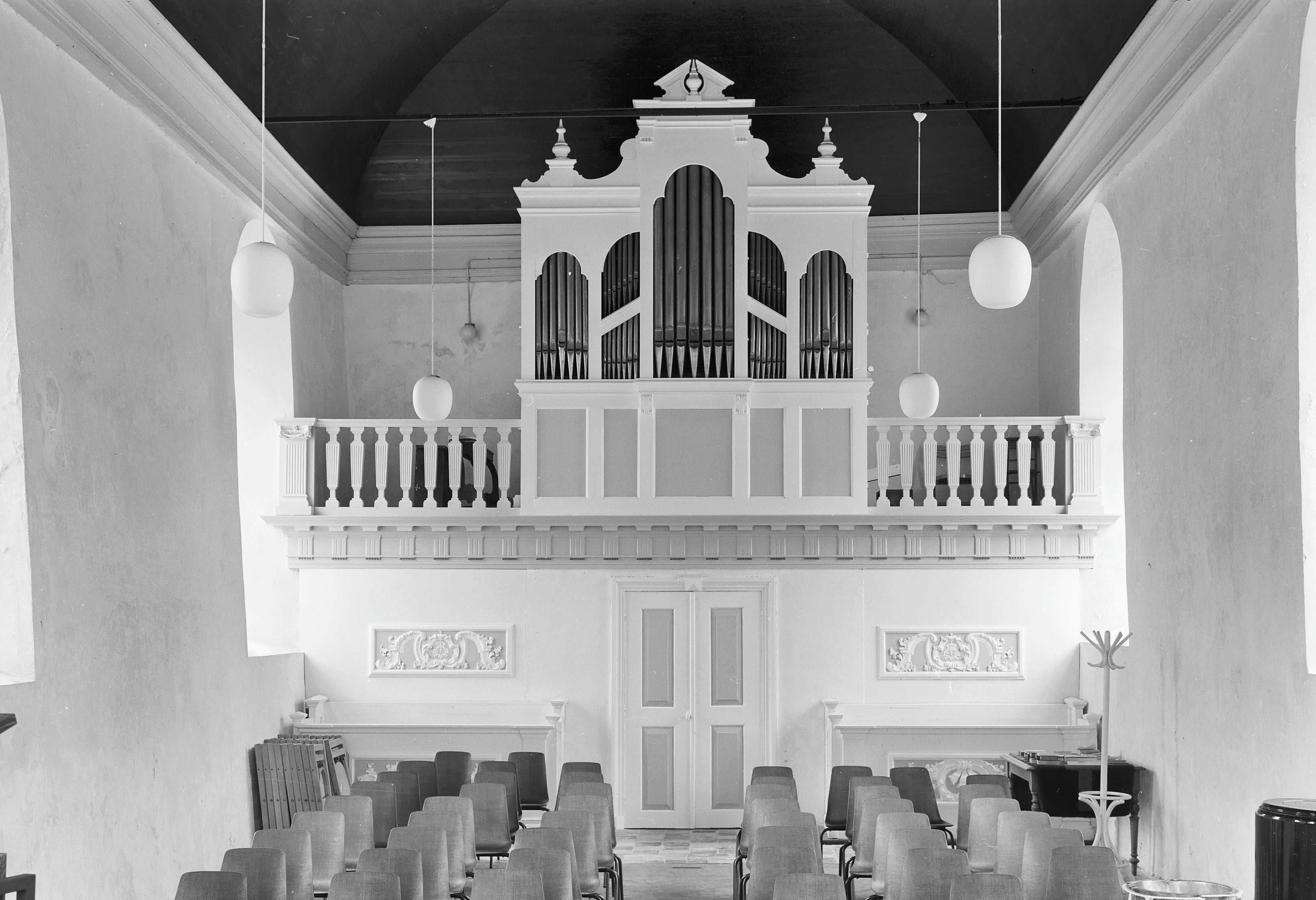 Nederlands Hervormde Kerk: interieur naar het westen